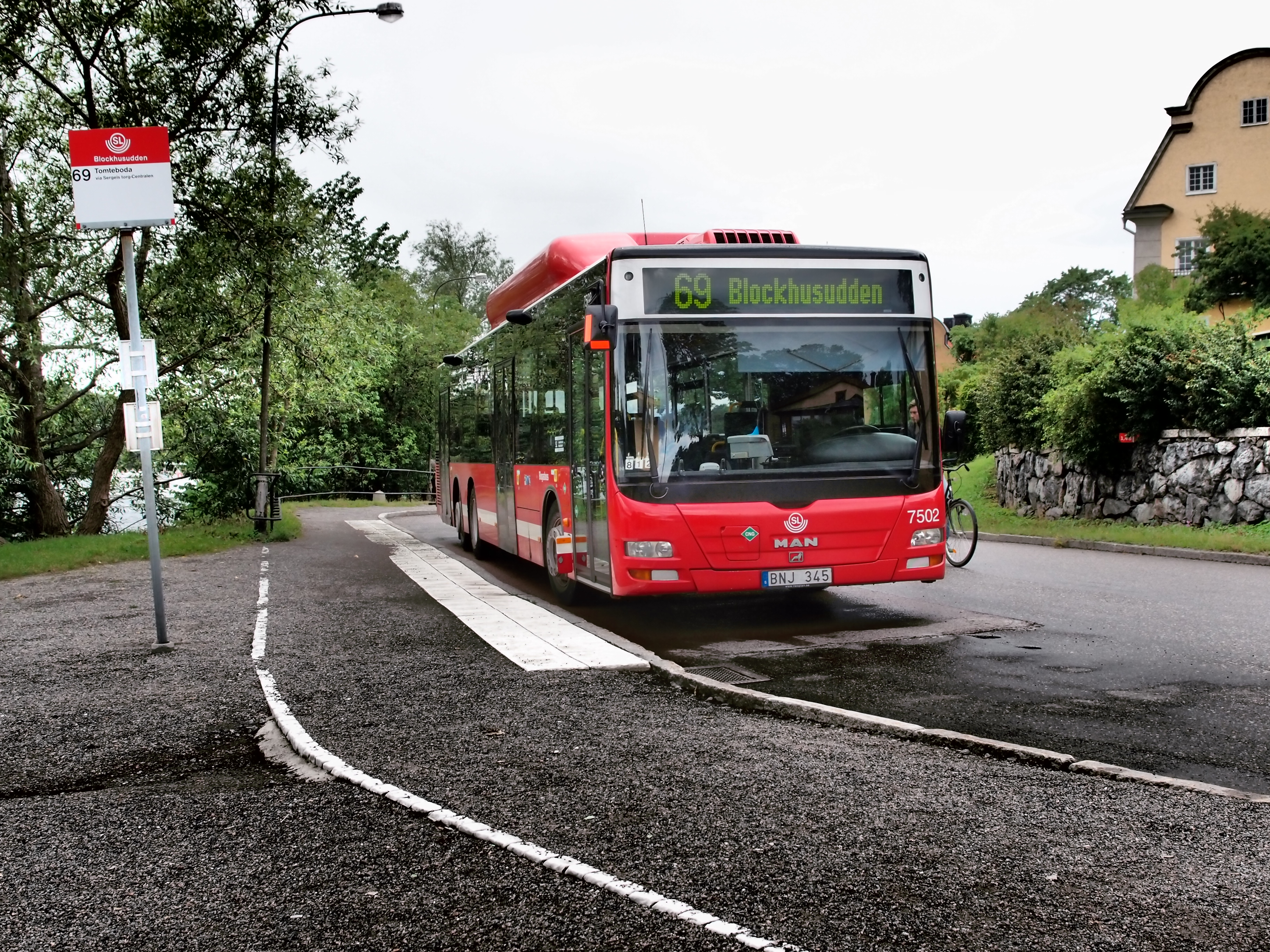 MAN bus te Stockholm (2011'